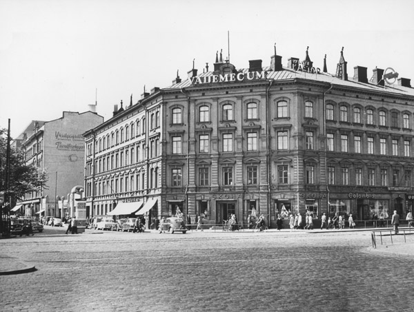 Makkaratalon paikalta purettu Skohan talo